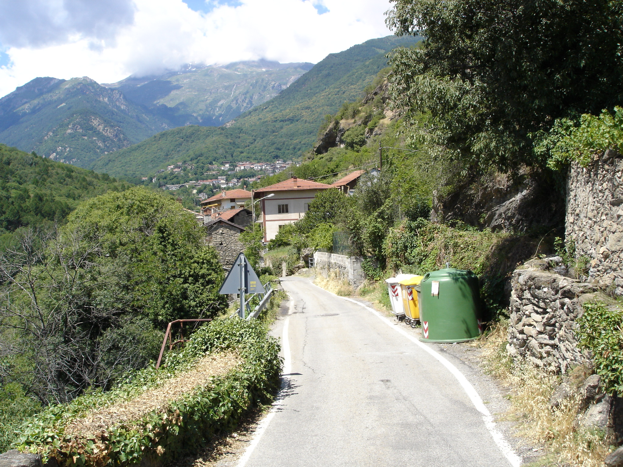 Giaglione, Piemonte